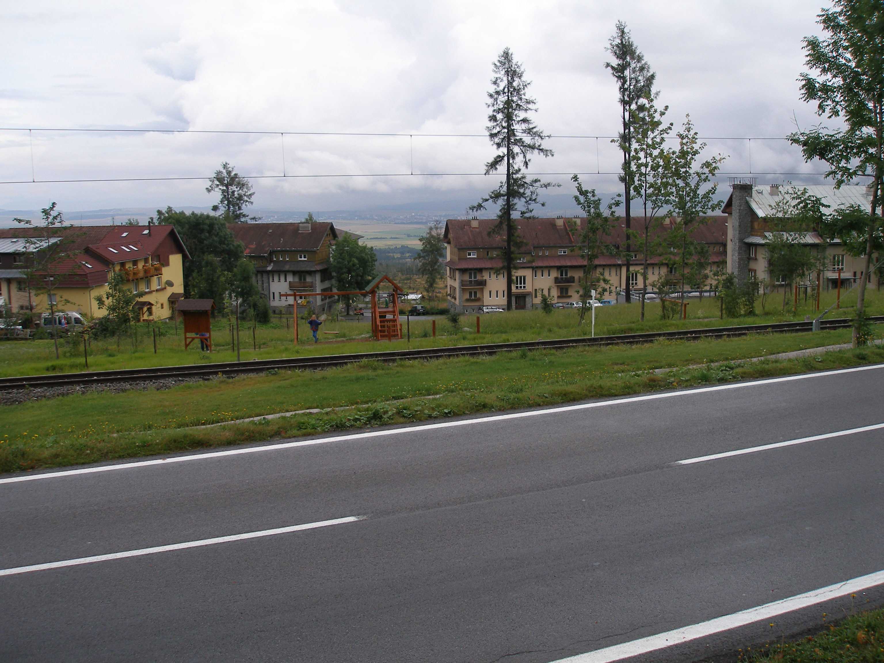 Tatranská osada Nový Smokovec